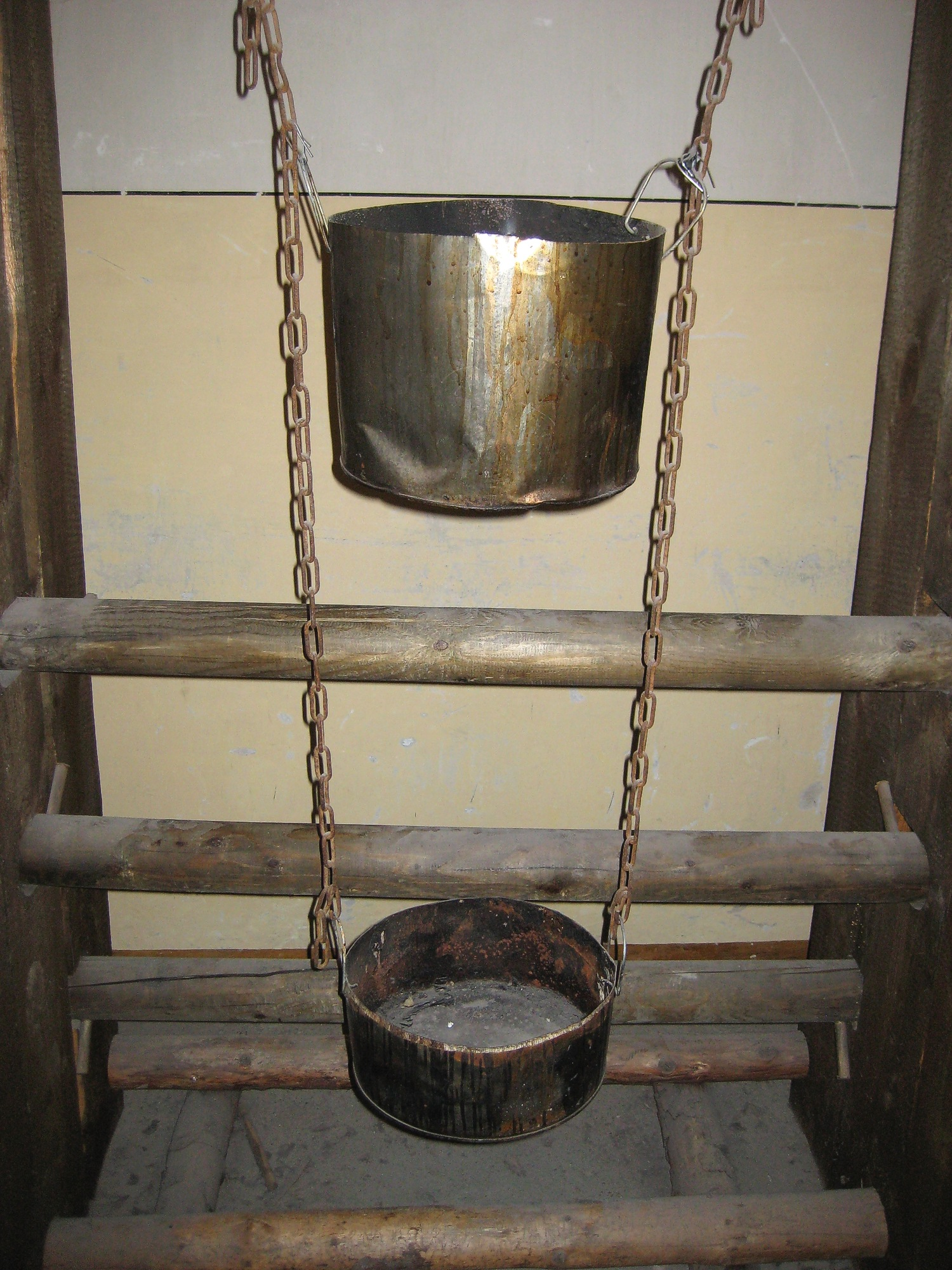 Rekonstruierte Chinesische Wasserfolter in der Gedenkstätte Berlin-Hohenschönhausen